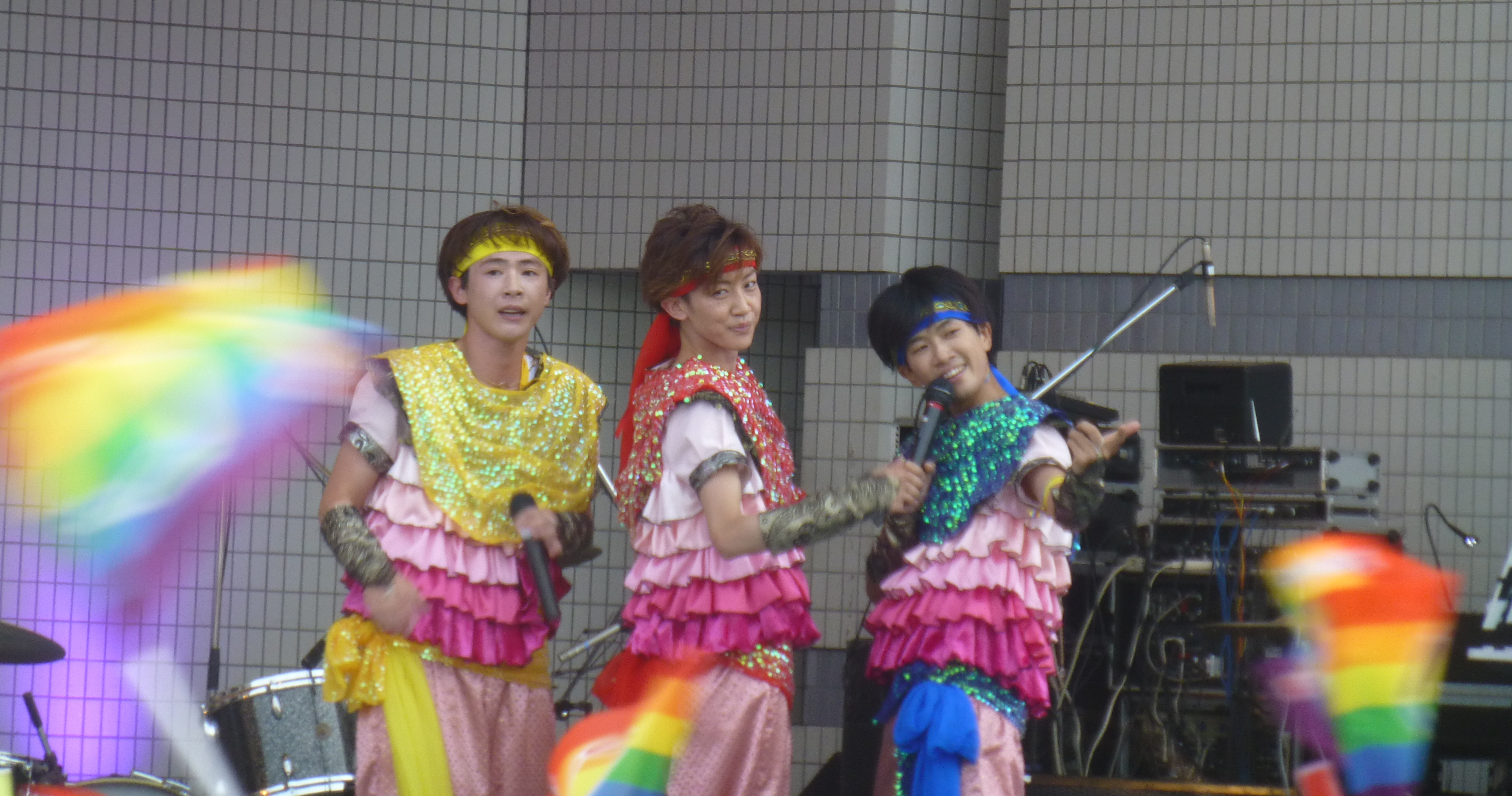 東京レインボープライド（とうきょうレインボープライド, Tokyo Rainbow Pride)